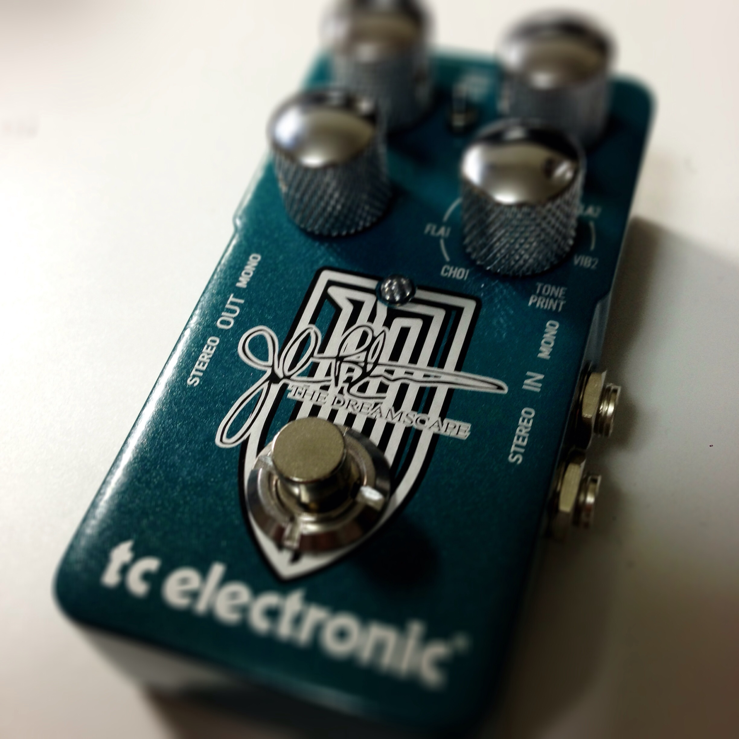 tc electronic THE DREAMSCAPE - John Petrucci Signature Pedal